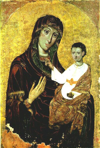 Borkolabovskaya icon of virgin Mary / Борколабовская икона Божией Матери